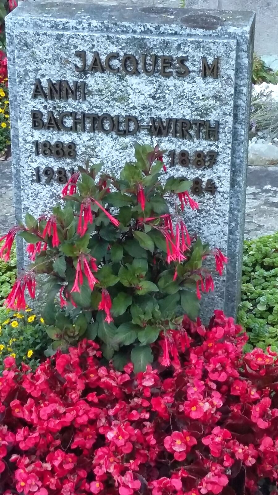 Grabstein von Jacques M. Bächtold und seiner Frau Anni, geborener Wirth, in Niederweningen, Kanton Zürich.